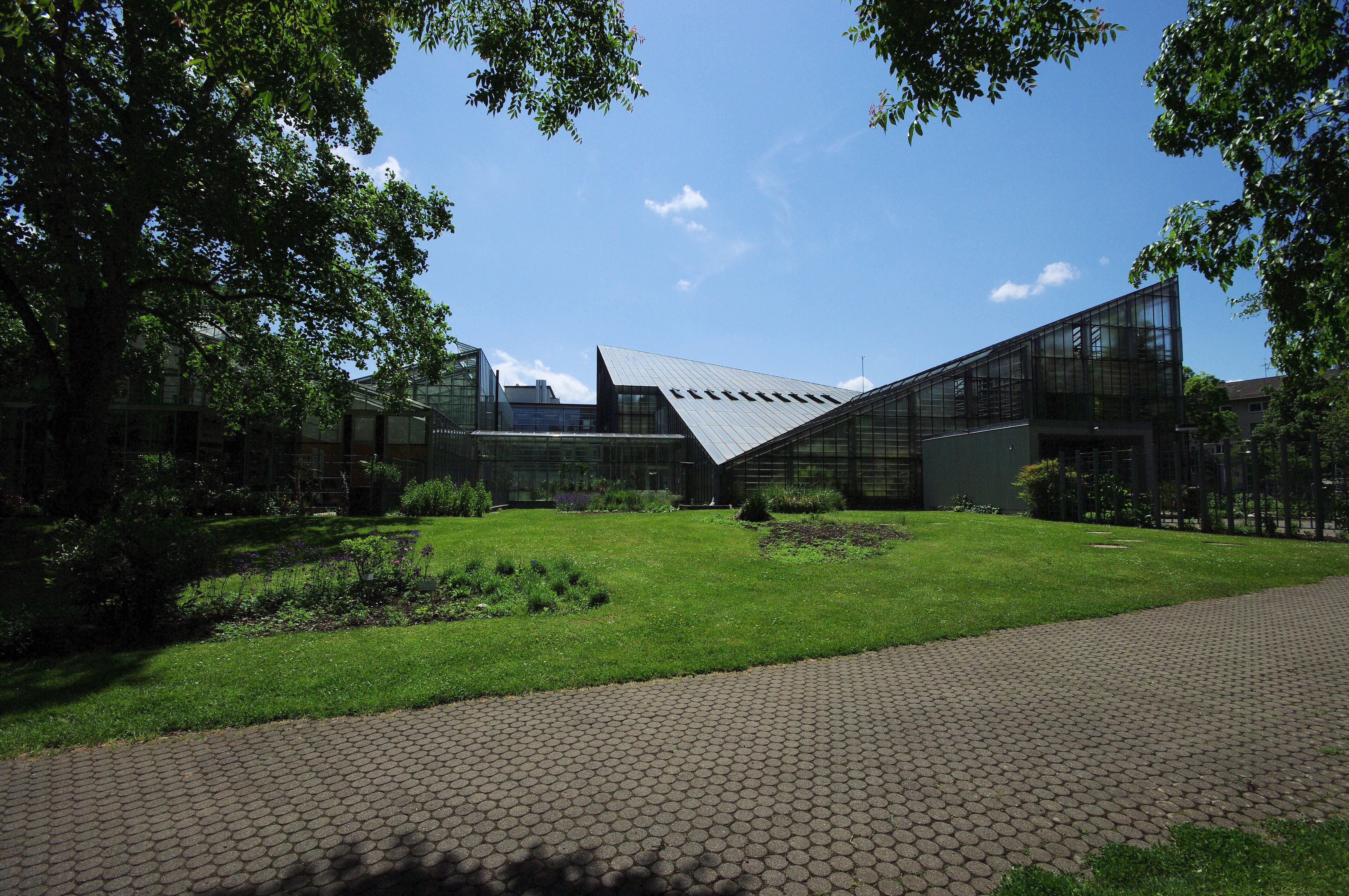 Der Zoologische Garten in Freiburg